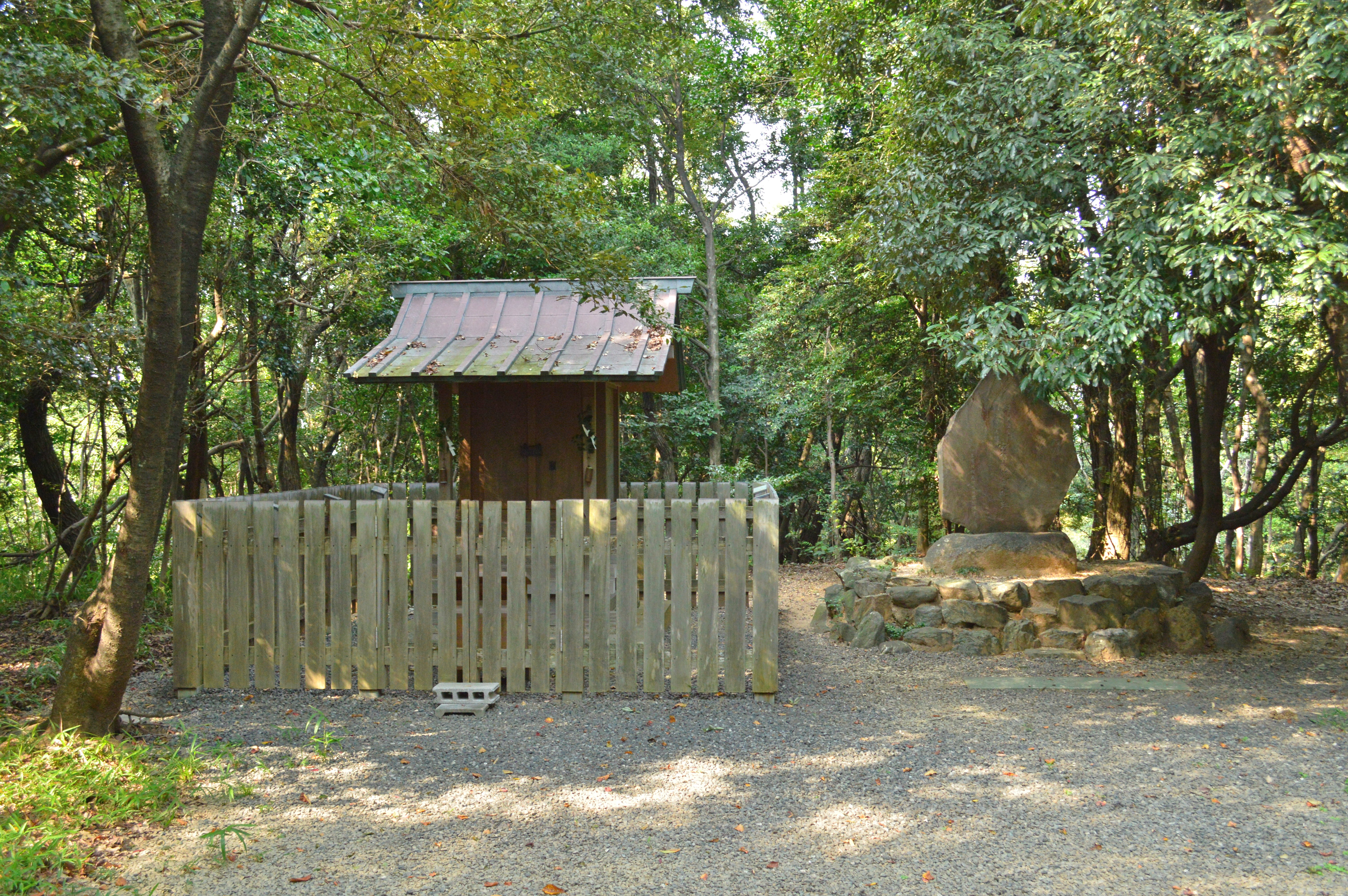 熱田神宮 境外末社元宮社